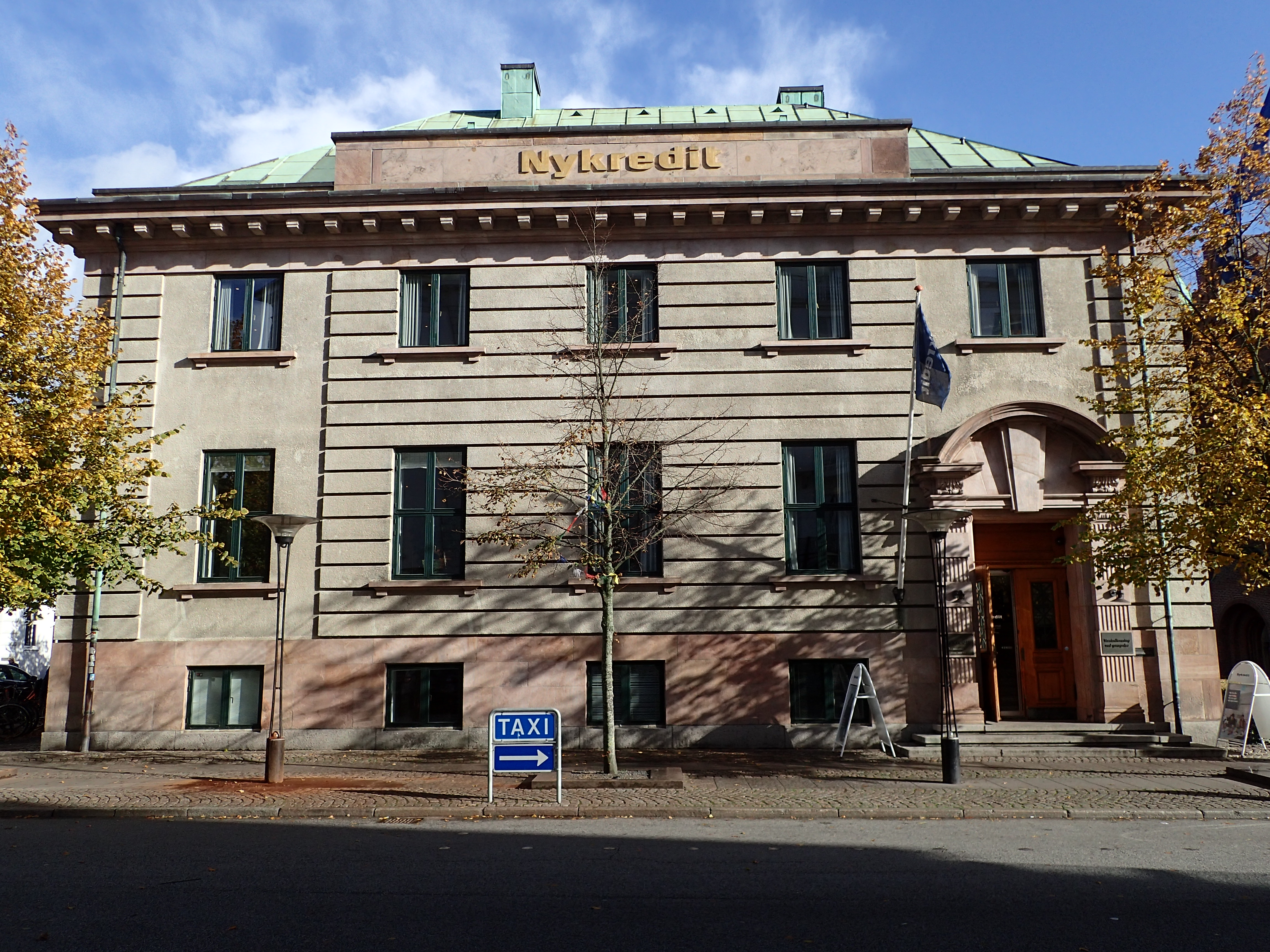 Front facade, Nationalbankens tidligere filial i Aarhus.